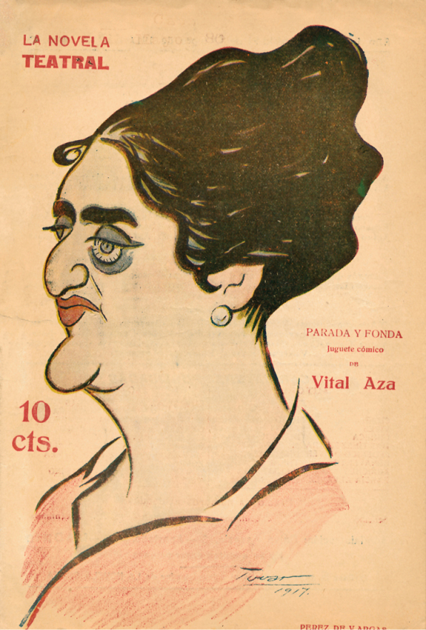 Caricatura de Mercedes Pérez de Vargas.